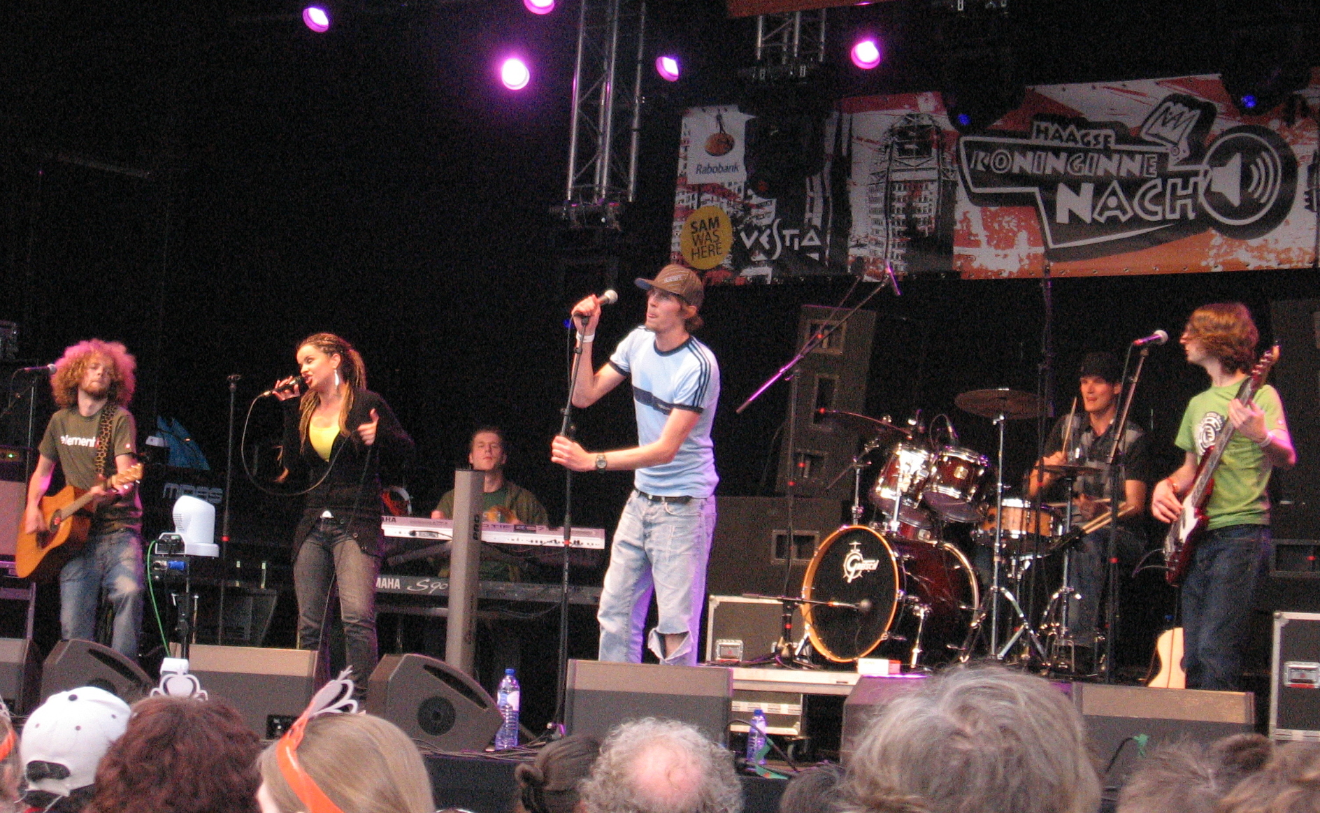 Leaf tijdens Koninginnenach 2008